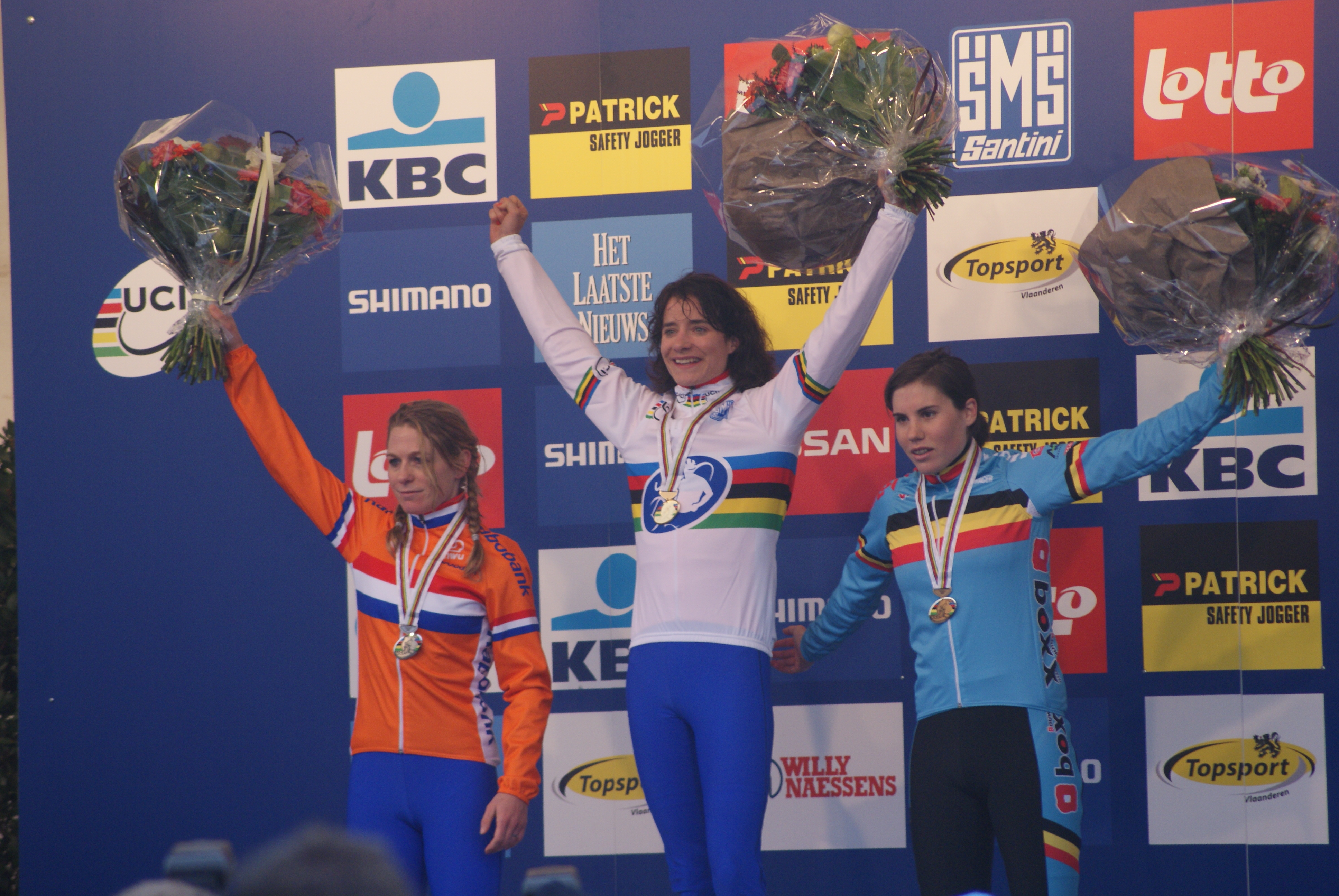 Podium van het WK veldrijden 2012 voor dames in Koksijde. Goud: Marianne Vos, zilver Daphny Van den Brand, brons Sanne Cant